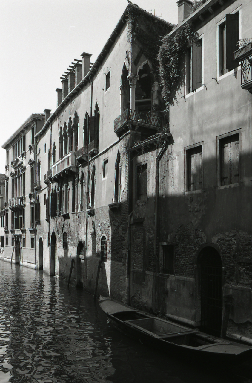 Servizio fotografico : Venezia, 1968 / Paolo Monti. - Strisce: 5, Fotogrammi complessivi: 23 : Negativo b/n, gelatina bromuro d'argento/ pellicola ; 35 mm. - ((I fotogrammi hanno una doppia numerazione. . - Sul portanegativi: Nikon Agfa 21. - Sul dorso del portanegativi Monti specifica: "Finestre-Graffiti". - Probabilmente questa specifica in penna biro rossa si riferisce a ricerche personali che esulano dal contesto del servizio commissionato da Electa. - Occasione: Pubblicazione: "Edoardo ARSLAN, Venezia gotica: architettura civile gotica veneziana, Milano, Electa, 1970". - Fonte: Agenda di Paolo Monti: Venezia Architettura Gotica Civile / Ed. Electa maggio/giugno 1968 (1968/05-1968/06), presso Archivio Paolo Monti